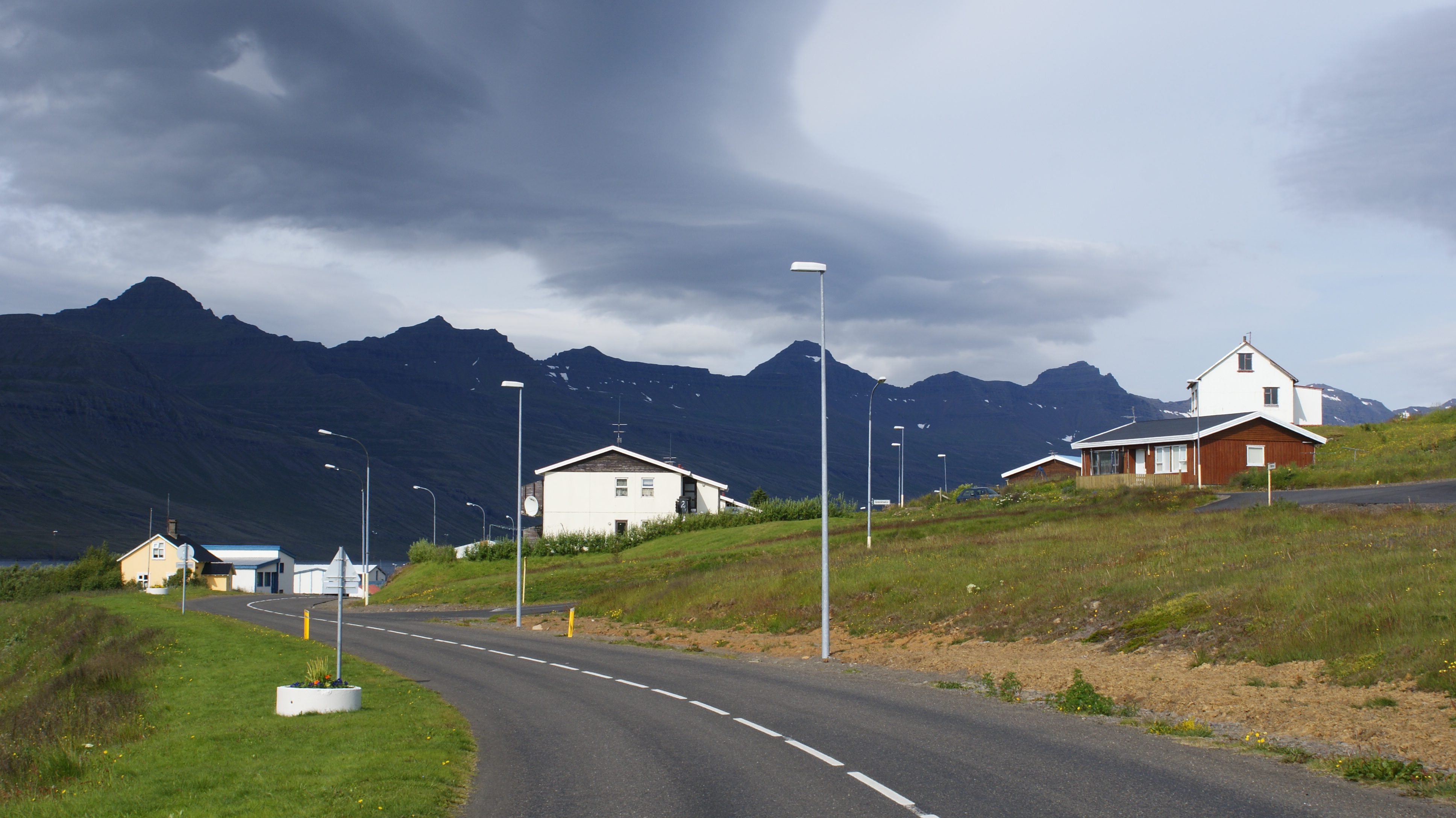 Stöðvarfjörður, Austfjarðar, Iceland.